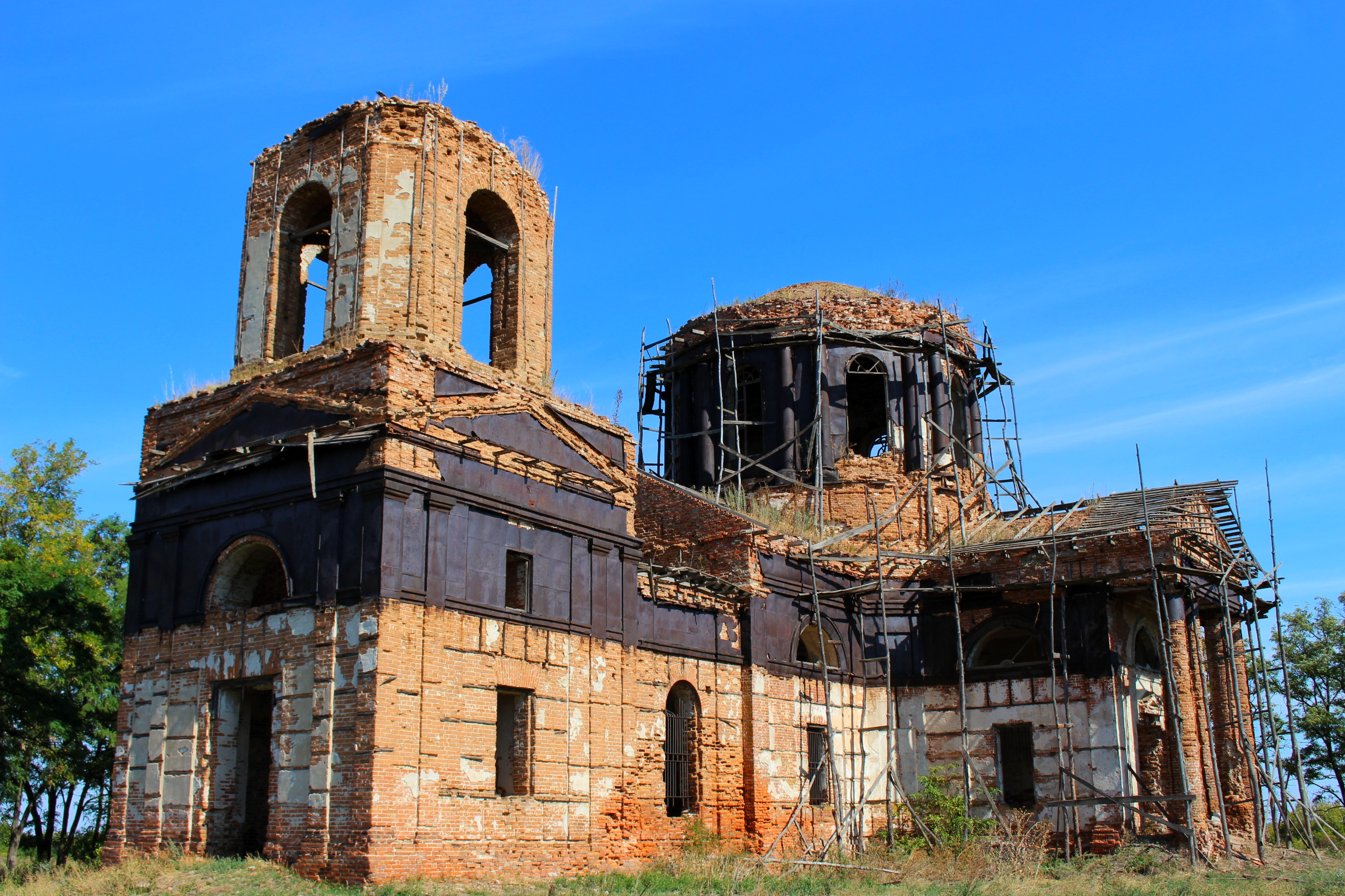 На цьому фото зображено Федорівську Благовіщенську церкву в занедбаному стані с.Федорівка, Карлівський район, Полтавська область